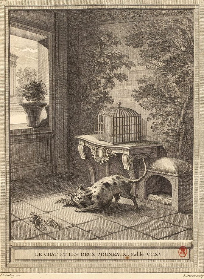 Gravure réalisée par Pierre Jacques Duret d'après un dessin de Jean-Baptiste Oudry représentant la fable Le chat et les deux moineaux de Jean de La Fontaine (fable 2 du livre XII). Cette gravure est parue dans l'édition complète des fables de La Fontaine, parue en quatre tomes chez l'éditeur Desaint & Saillant, rue saint Jean de Beauvais à Paris, 1755-1759.